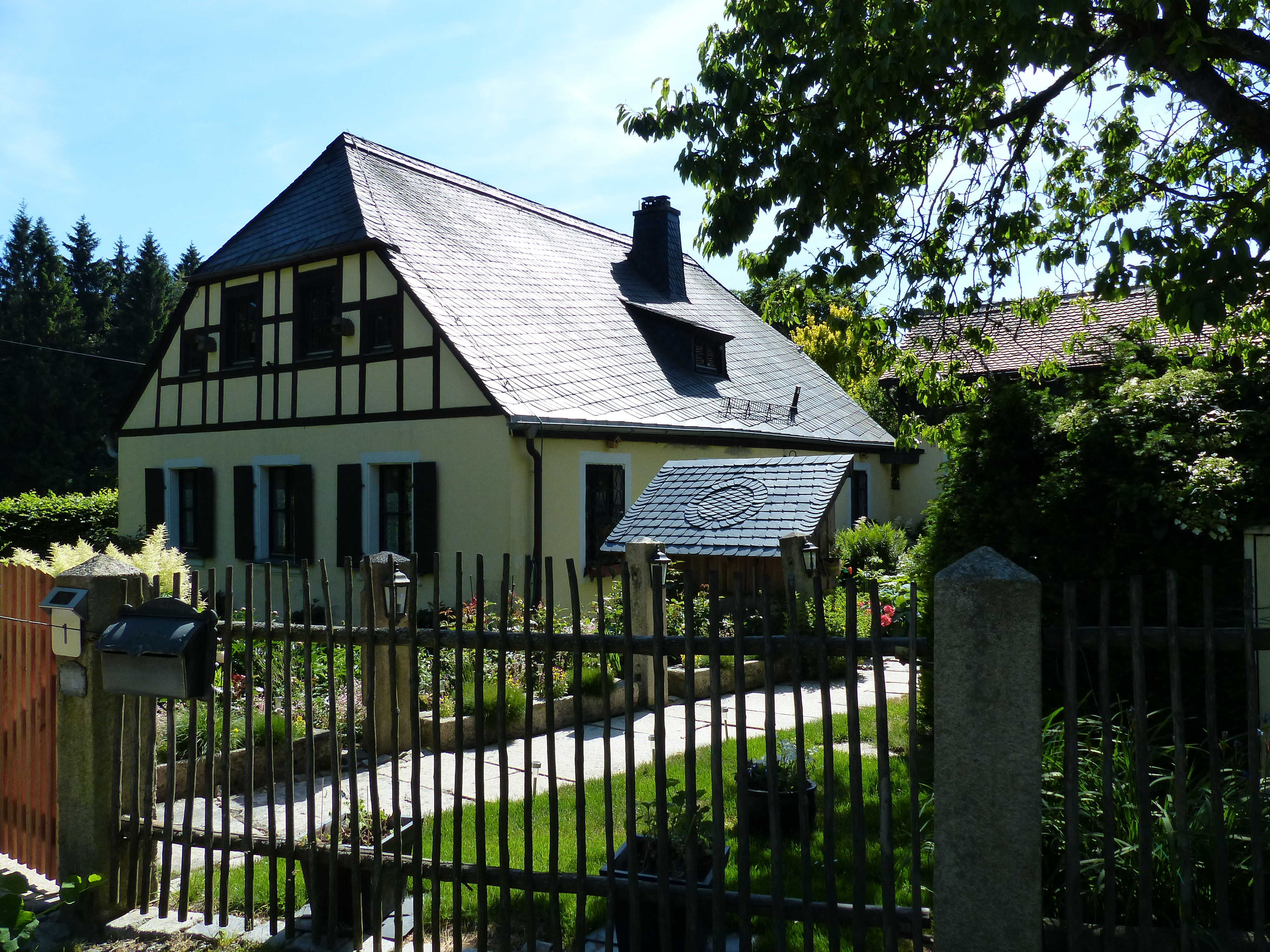 Ortsteil Torfmoorhölle von Weißenstadt